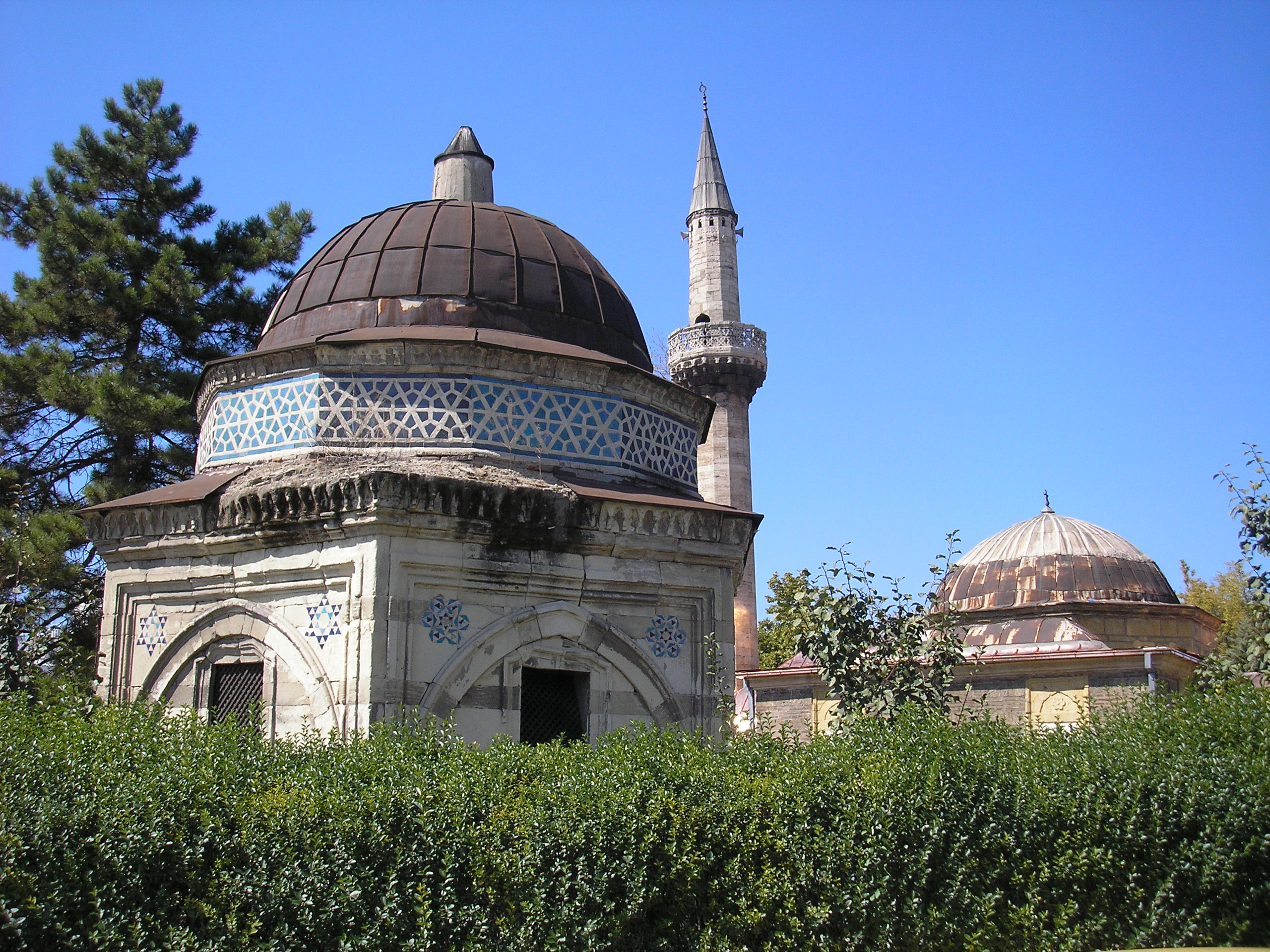 Исак бей тюрбе и Аладжа джамия, Скопие, Република Македония.